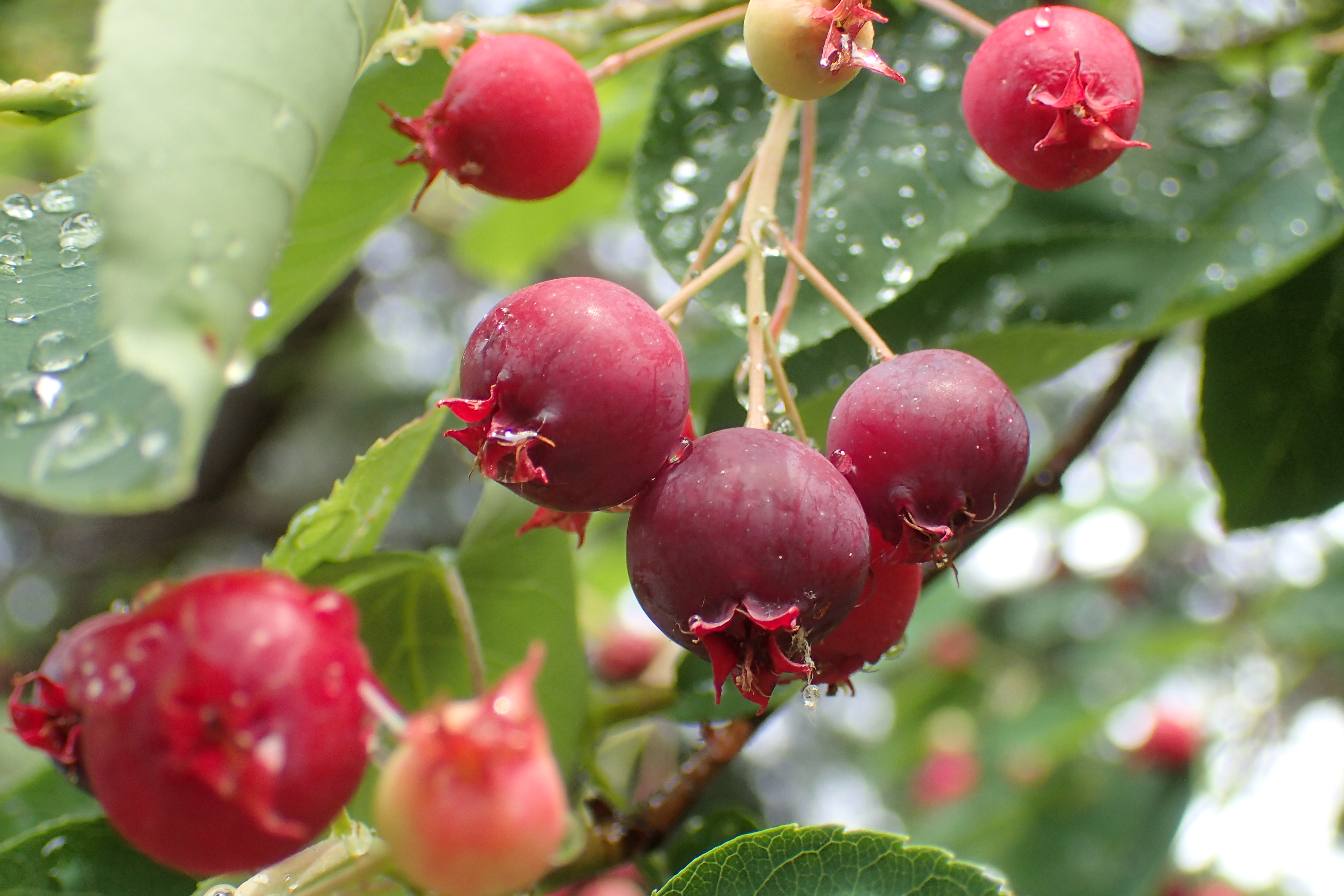 ジューンベリー [アメリカザイフリボク] [Amelanchier canadensis]